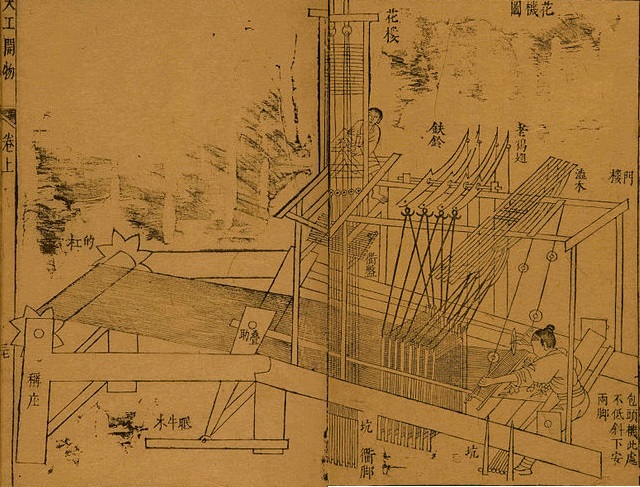 中文（香港）: 天工開物 花機圖